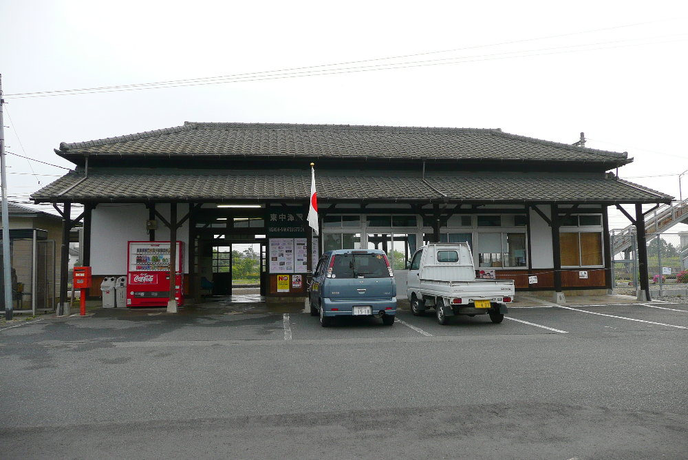 日豊本線東中津駅・駅舎 投稿者↑PON（ウエポン）が2007年5月5日に撮影 一部編集の上で2007年5月12日にアップロード